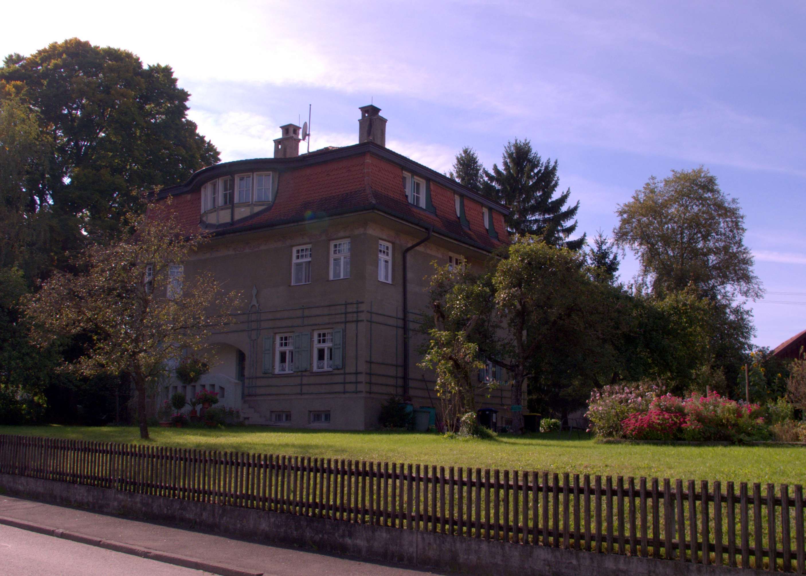 zweigeschossiger Putzbau mit weit überstehendem Mansard-Walmdach und gemaltem Fries, Jugendstil, von Kurt Hertel, 1906/07